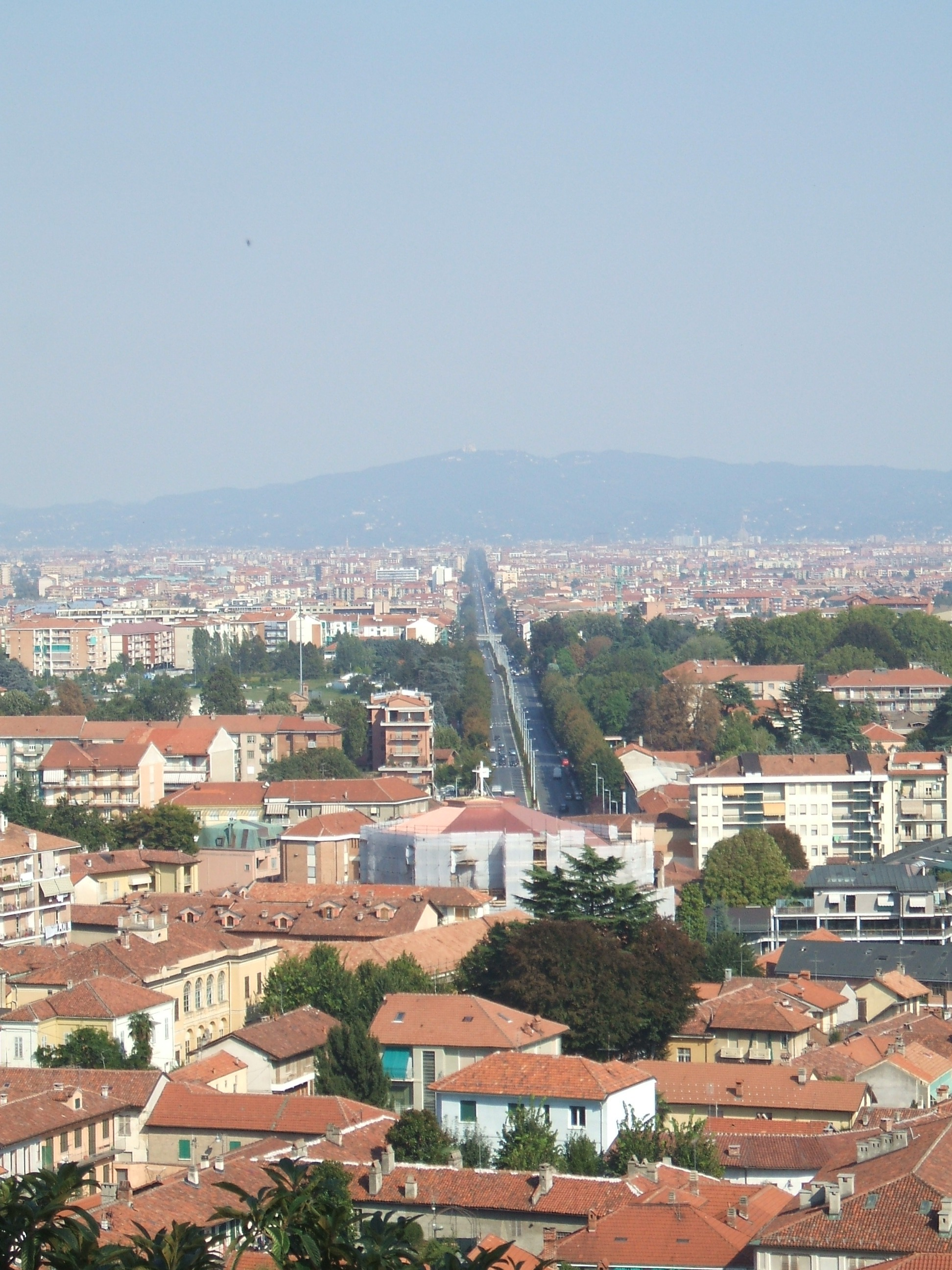 Veduta di Corso Francia dalla Collina di Rivoli; sullo sfondo, si scorge appena la Basilica di Superga.